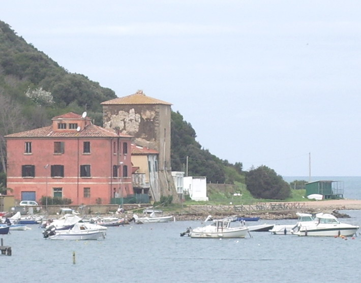 La Torre di Baratti nel comune di Piombino